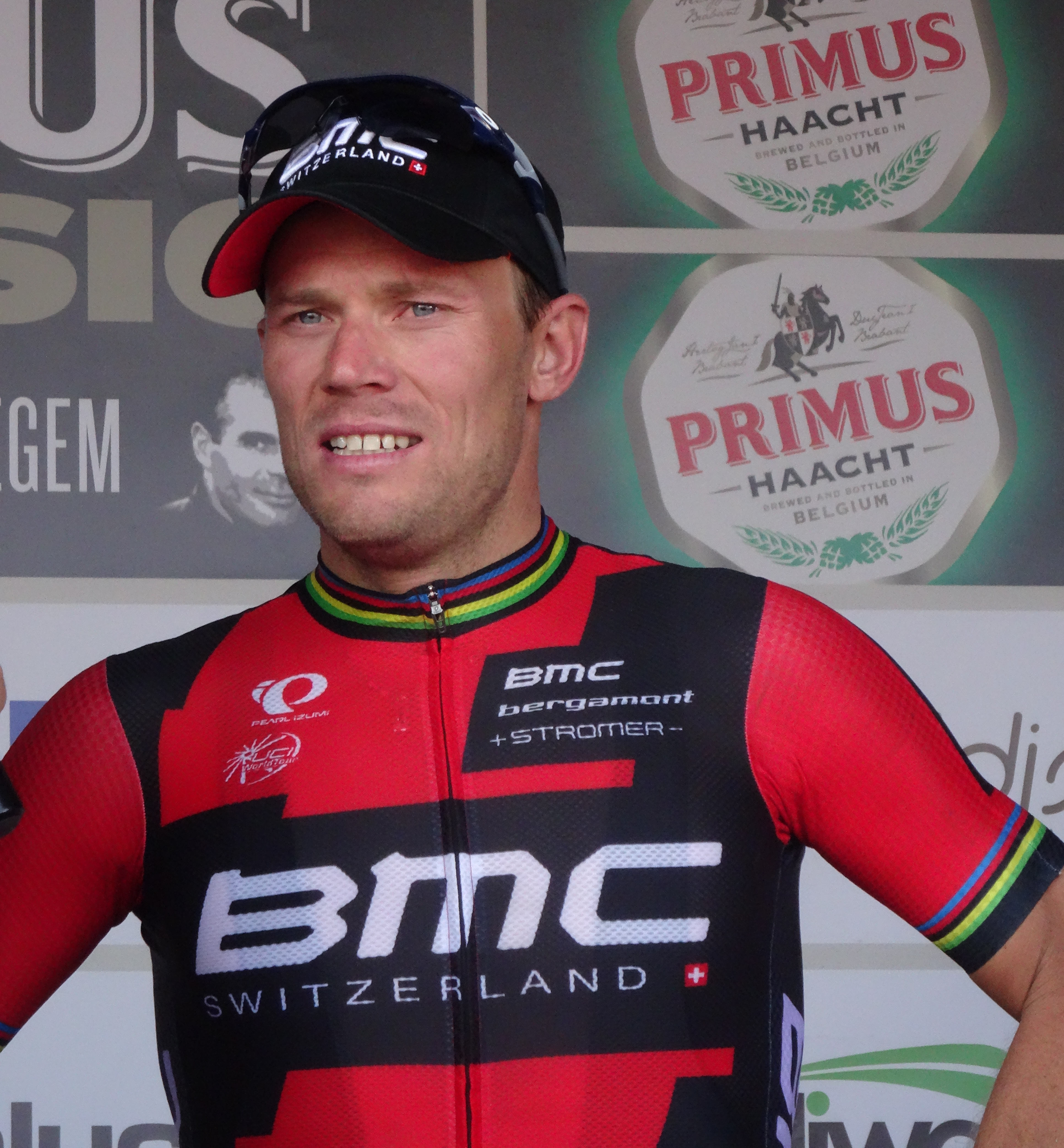 Grand Prix Impanis-Van Petegem 2014.